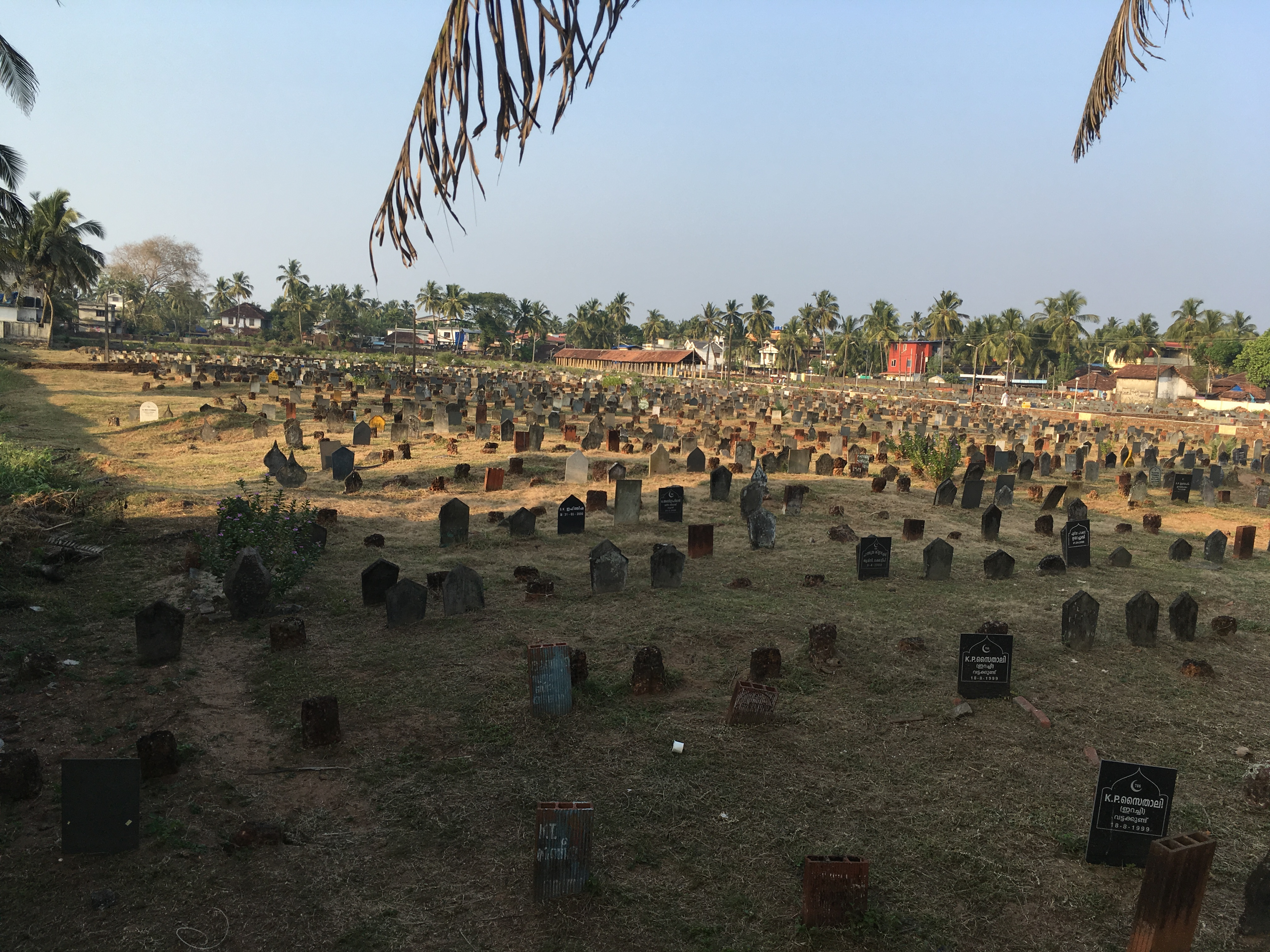 കണ്ണംപറമ്പ് ശ്മശാനത്തിലെ പള്ളിയുടെ വടക്ക് ഭാഗത്തെ ദൃശ്യം